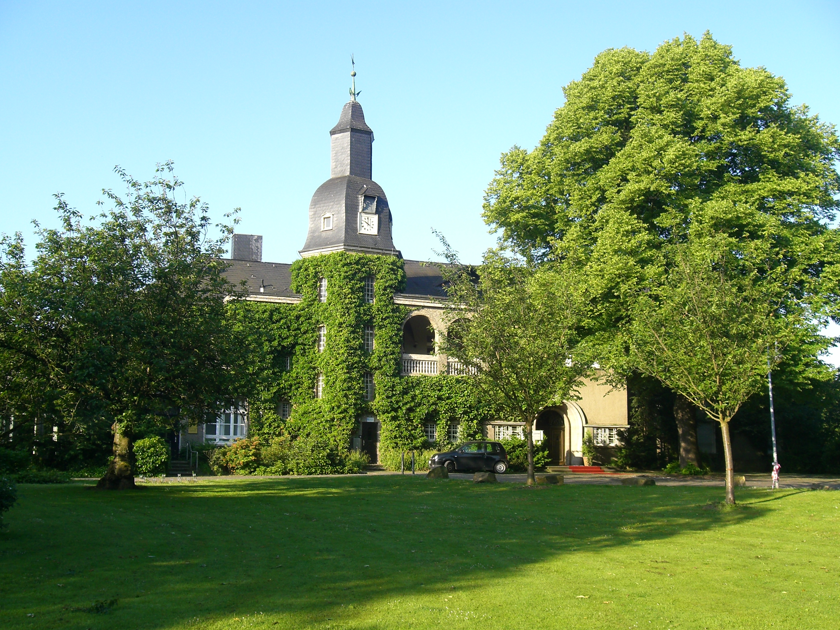 Schloss Styrum von Norden, heutiger Haupteingang